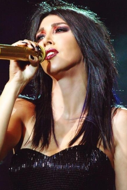 Hande Yener, Harbiye Cemil Topuzlu Açıkhava Tiyatrosu'nda sahnede. Üzerinde, binlerce taş kullanılarak Hakan Akkaya tarafından hazırlanan kıyafeti var.